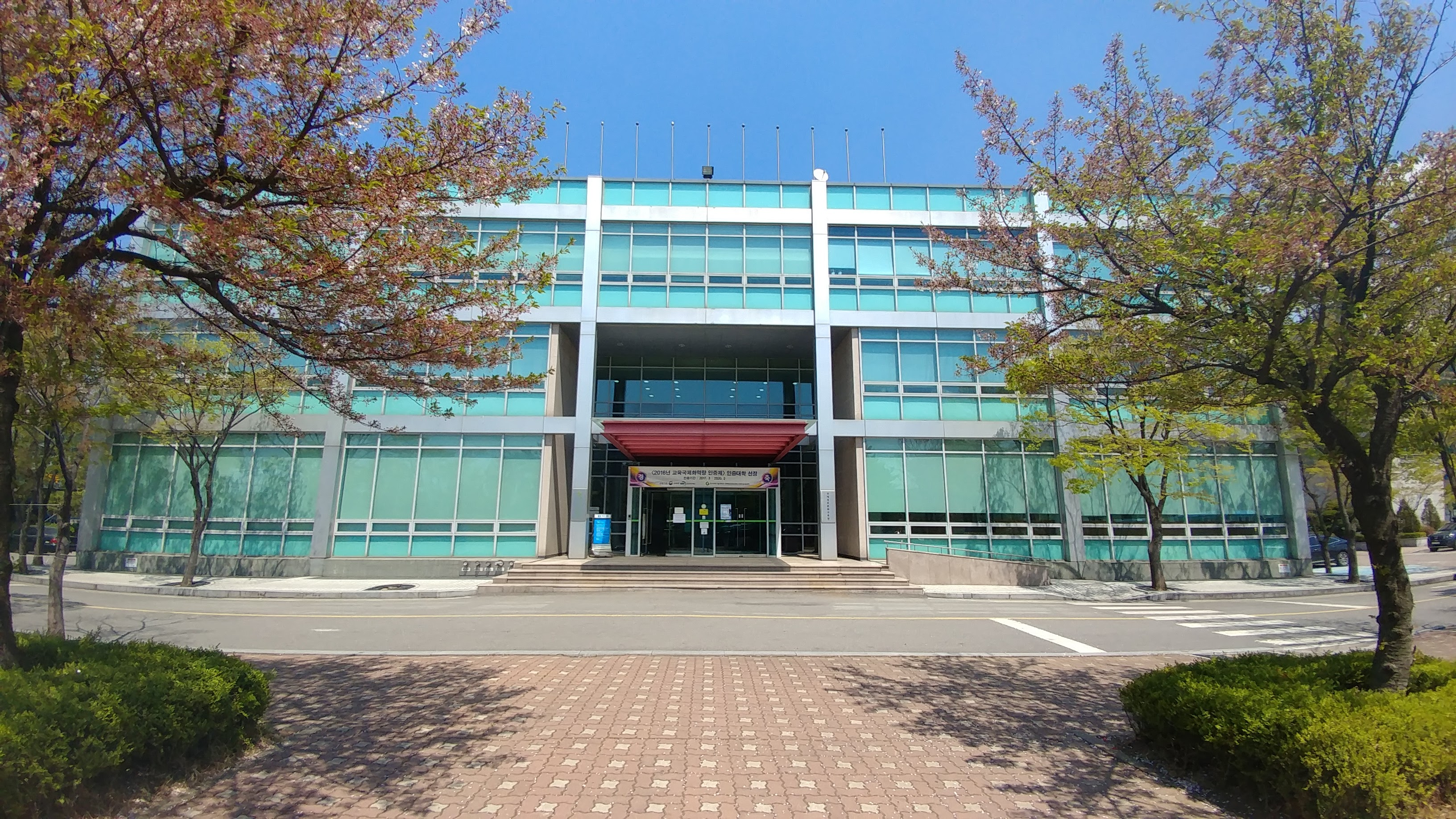 경기과학기술대학교 정보문화관